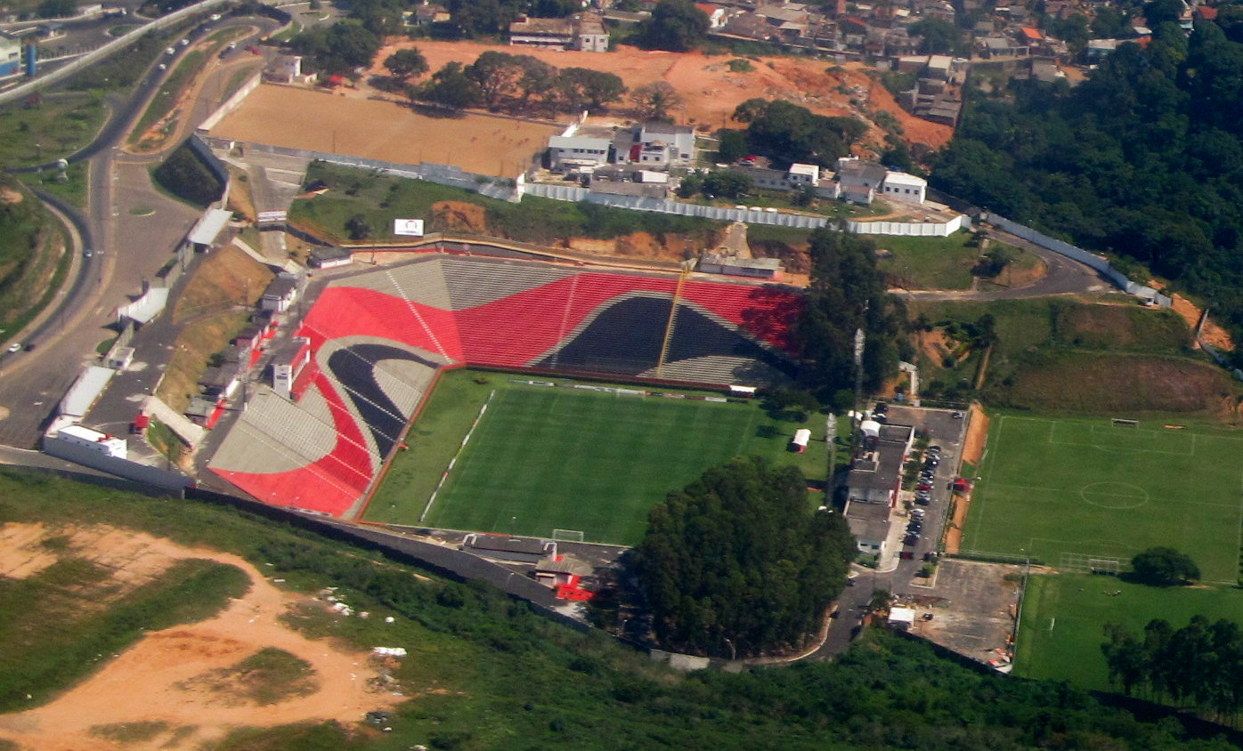 Barradão